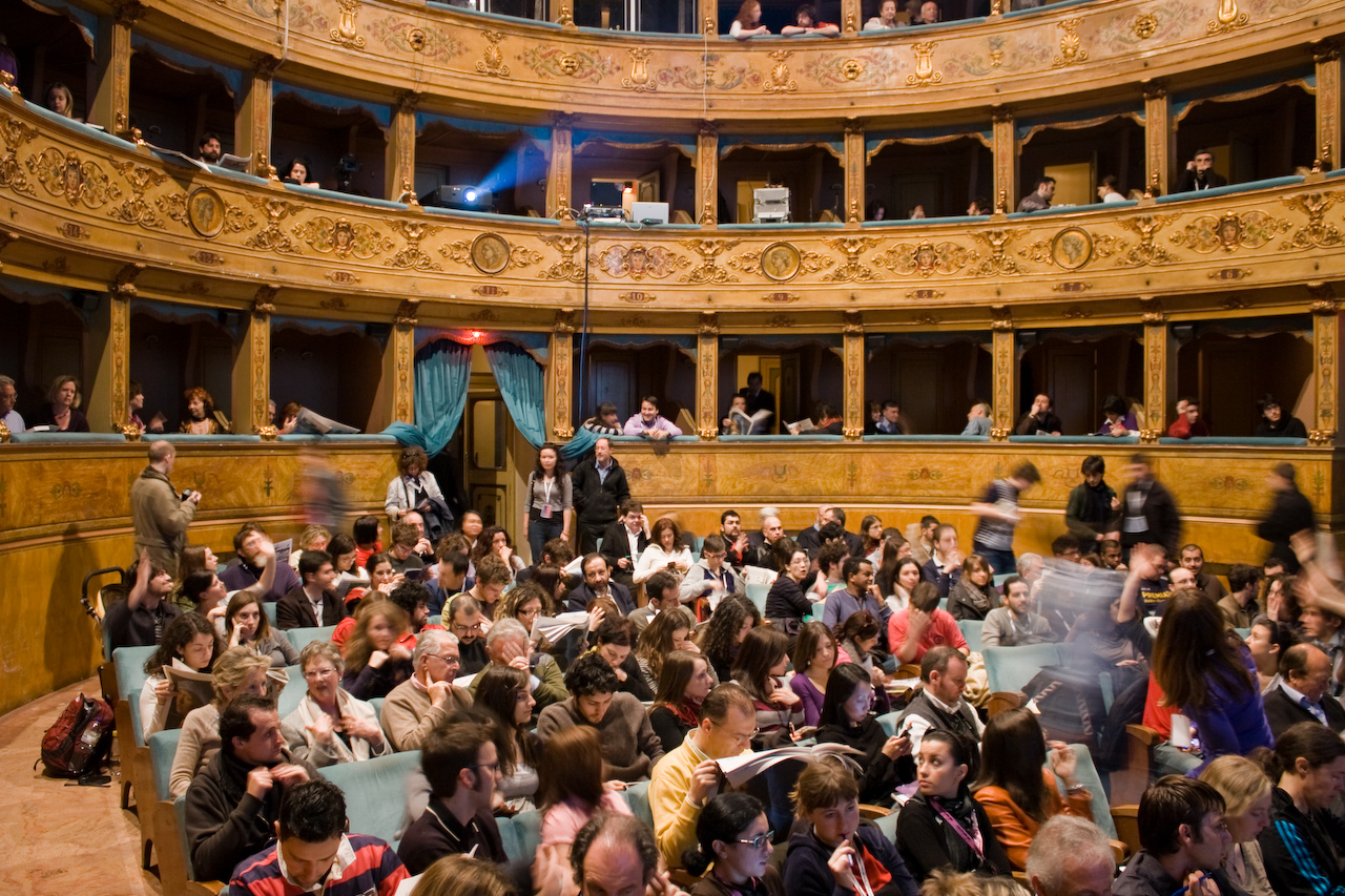 Teatro Pavone, Perugia. Conferenza durante il Festival Internazionale del Giornalismo, aprile 2009.